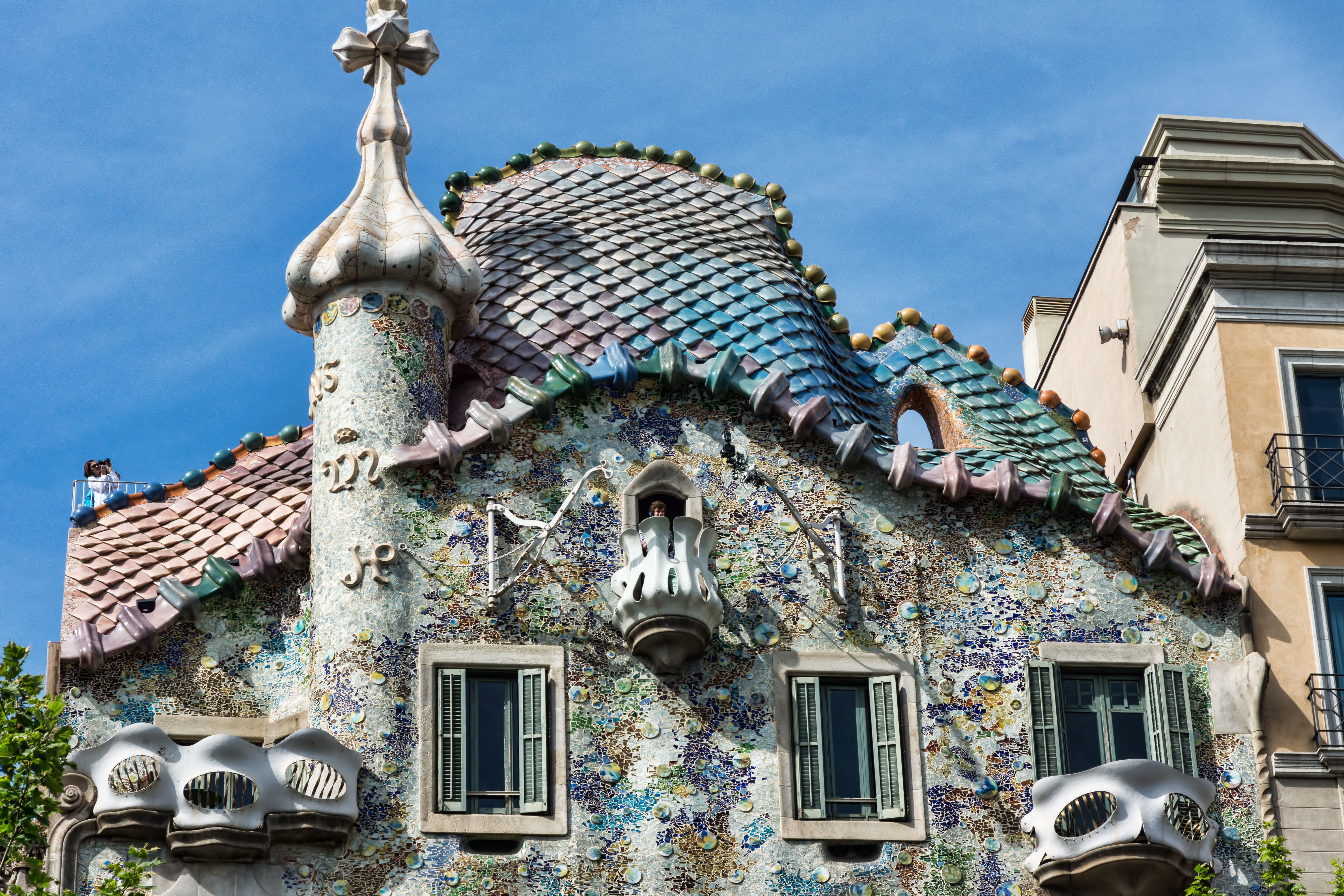 Barcelone - Casa Batlló - Toit